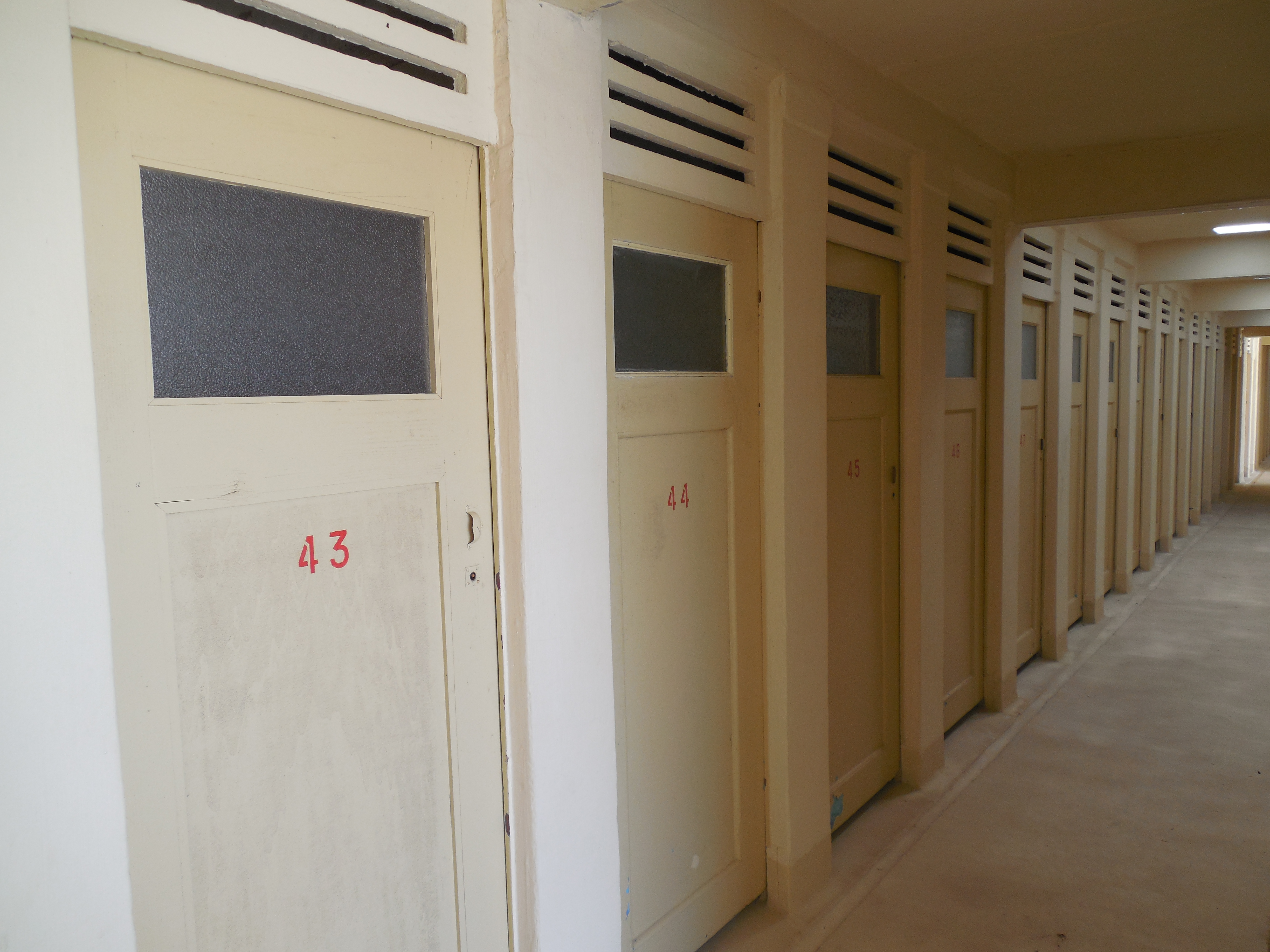 Cabines individuelles (246)